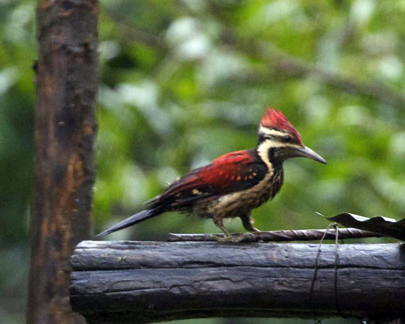 Black-rumped Flameback Dinopium benghalense ssp Dinopium benghalense psarodes Seen near Sigiriya, Central Sri Lanka Distribution: 690V8657